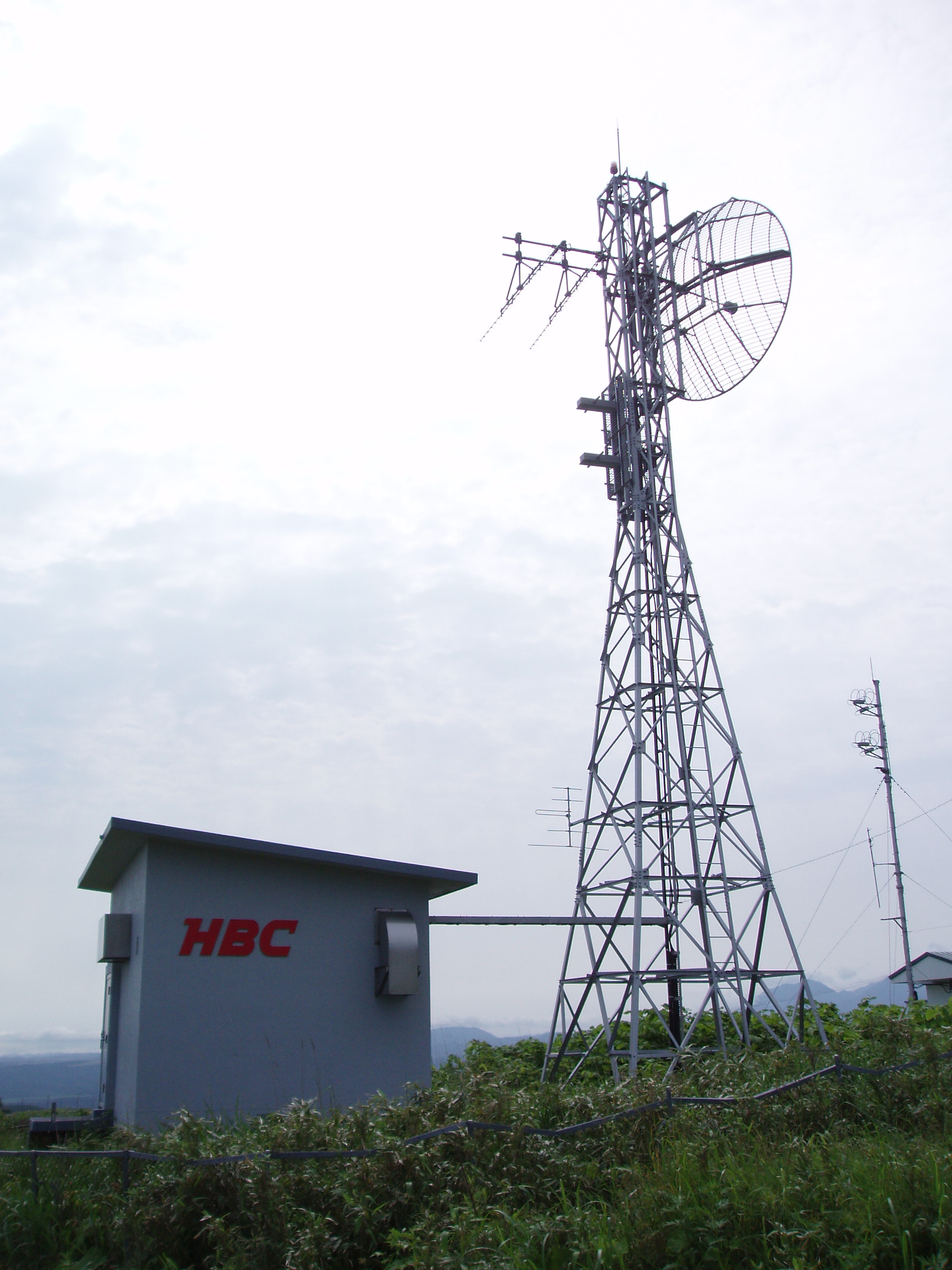 北桧山中継局 HBC送信設備